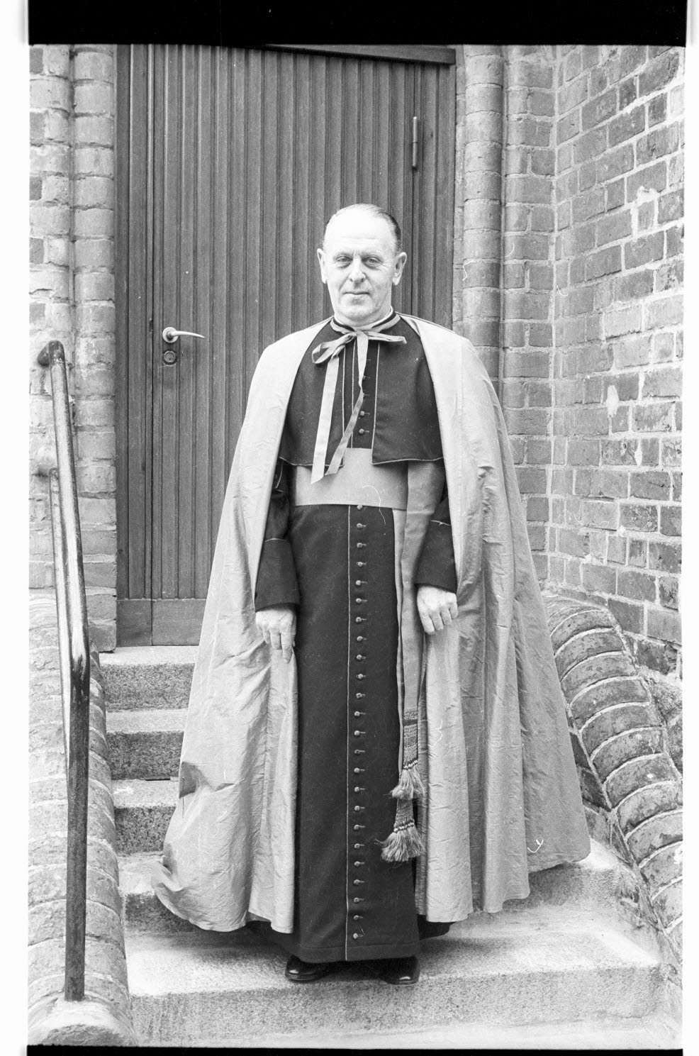 vor seiner Verabschiedung als Landesdechant.